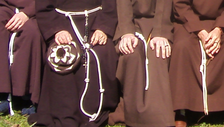 Foto de los hermanos Capuchinos de Paraguay, integrantes de la Custodia San Leopoldo Mandic